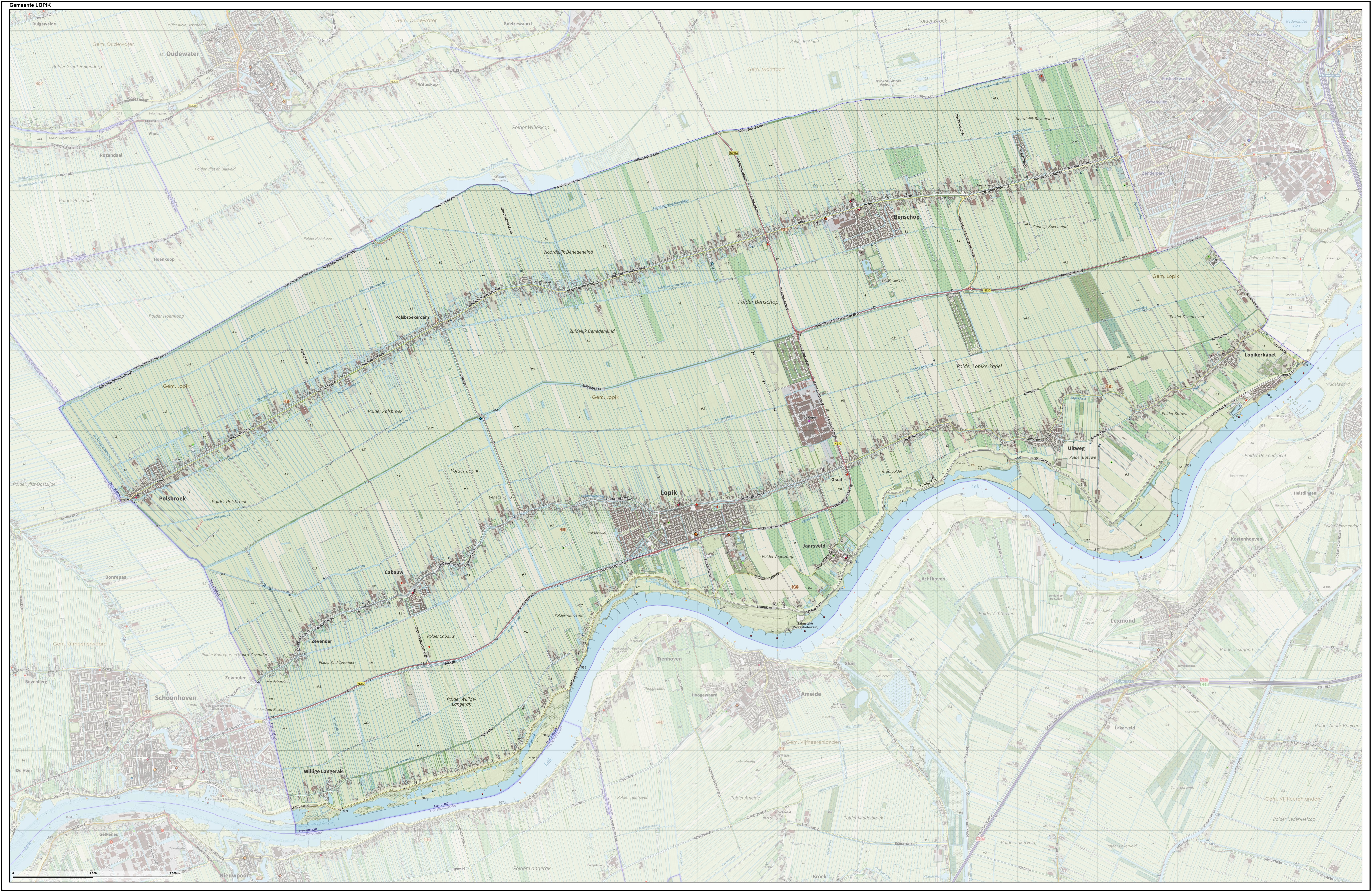 Topografische gemeentekaart. Resolutie: 400 pixels/km. Kaartbeeld samengesteld uit de open geodata van de Top10NL en Top25namen (Kadaster), Creative Commons-BY licentie. Gebouwvlakken uit open geodata BAG extract. Wegen uit de OpenStreetMap, OpenStreetMap community. Reliëfschaduw uit de Actuele Hoogtekaart AHN2. Samenstelling en kleurenschema: Jan-Willem van Aalst, met QGIS. Zie ook de Legenda.